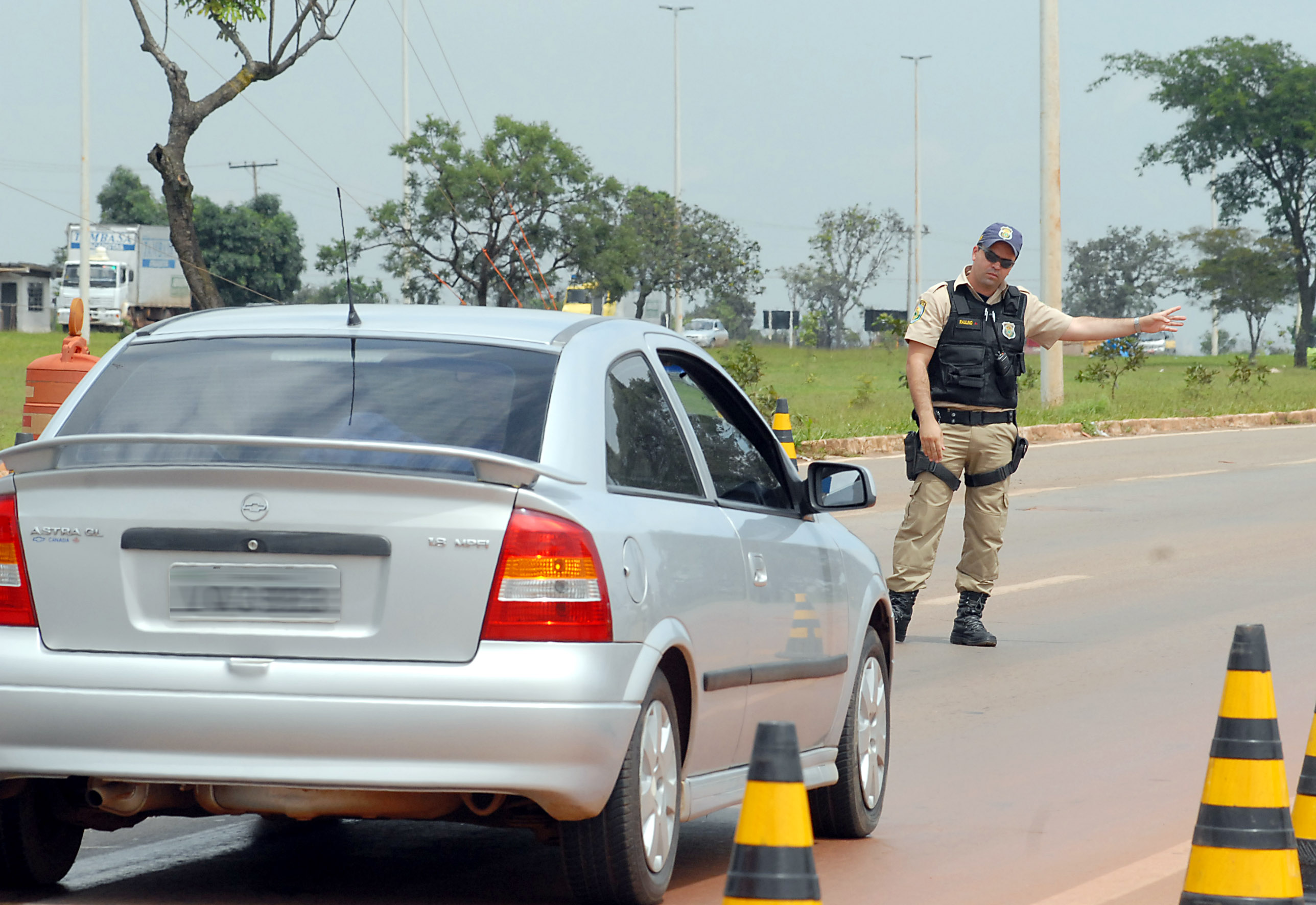 Operação rotineira da Polícia Rodoviária Federal na BR-040 que liga Brasília a Belo Horizonte.